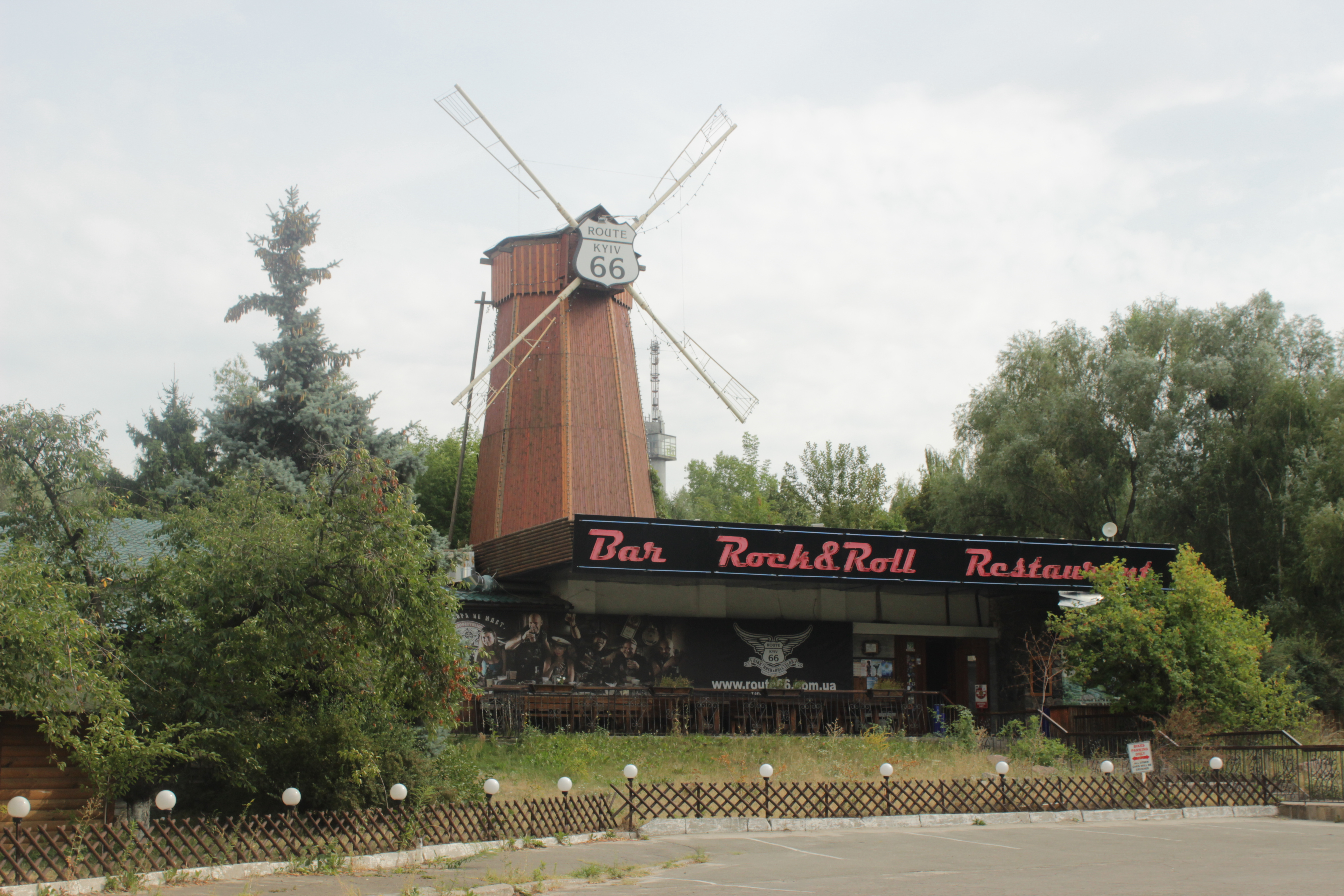 Ресторан «Вітряк», Київ, Глушкова Академіка просп., 11